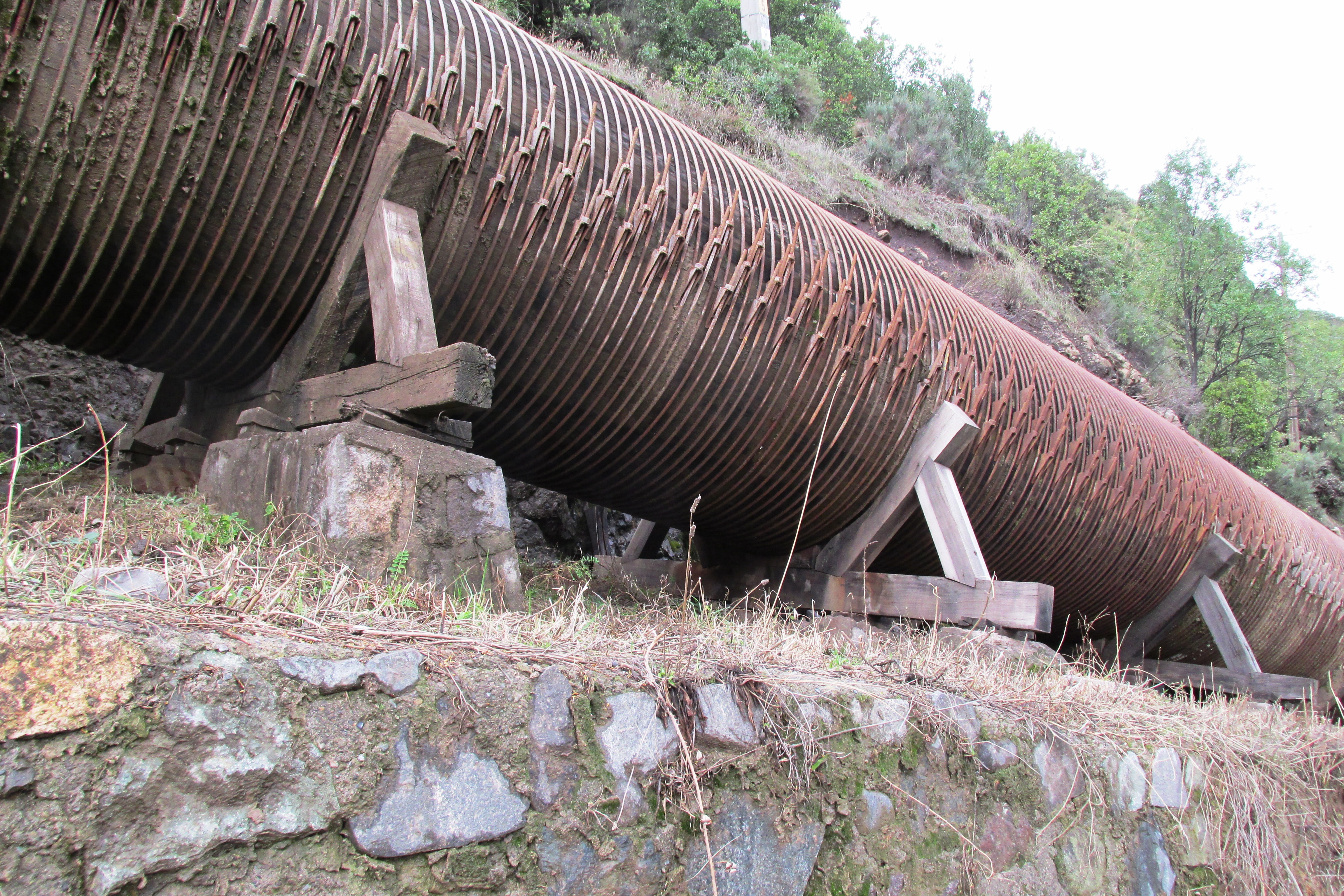 Tubería de madera de Pangal por donde circula el agua que alimenta la Central Hidroeléctrica de Pangal ubicada en la Cordillera de Los Andes Comuna de Machalí, sexta región de Chile. Declarada Monumento Nacional